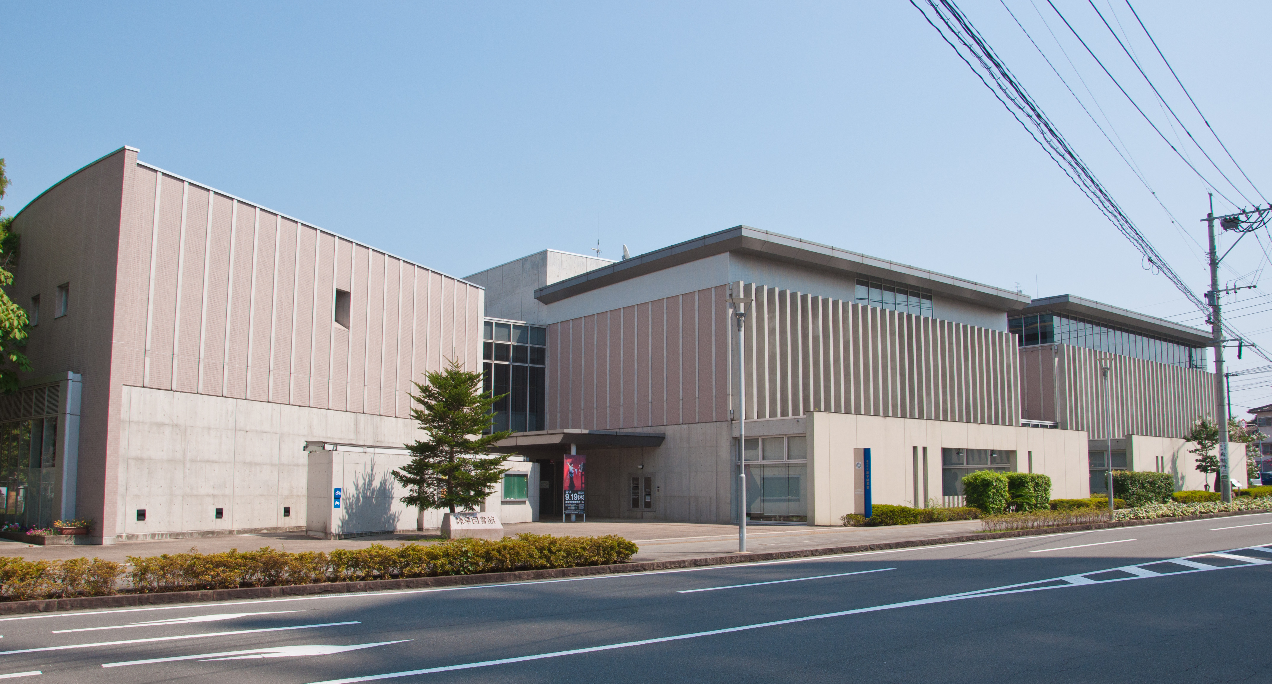 長崎県諫早市にある諫早図書館